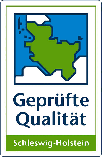 Logo von